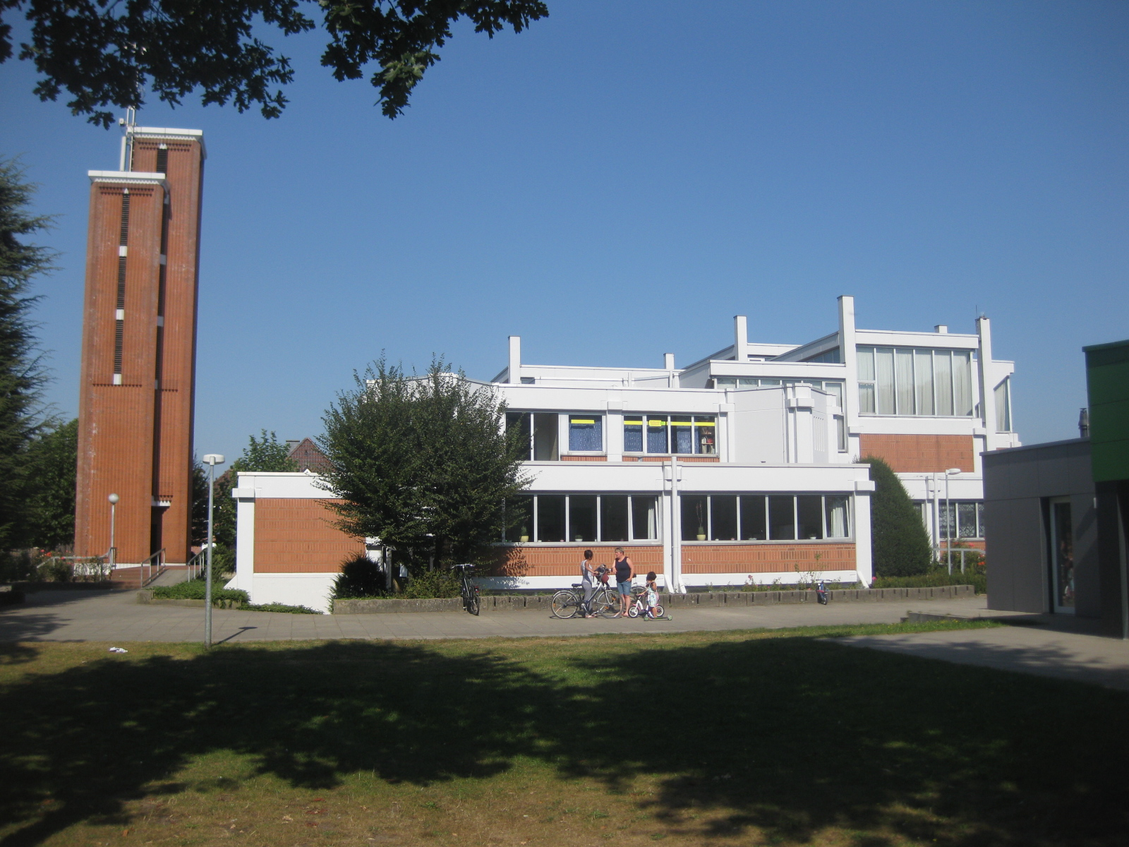 Kirche und Gemeindezentrum in elementierter Bauwesie (Architelt Dieter Georg Baumewerd, 1969), Turm wurde ergänzt.